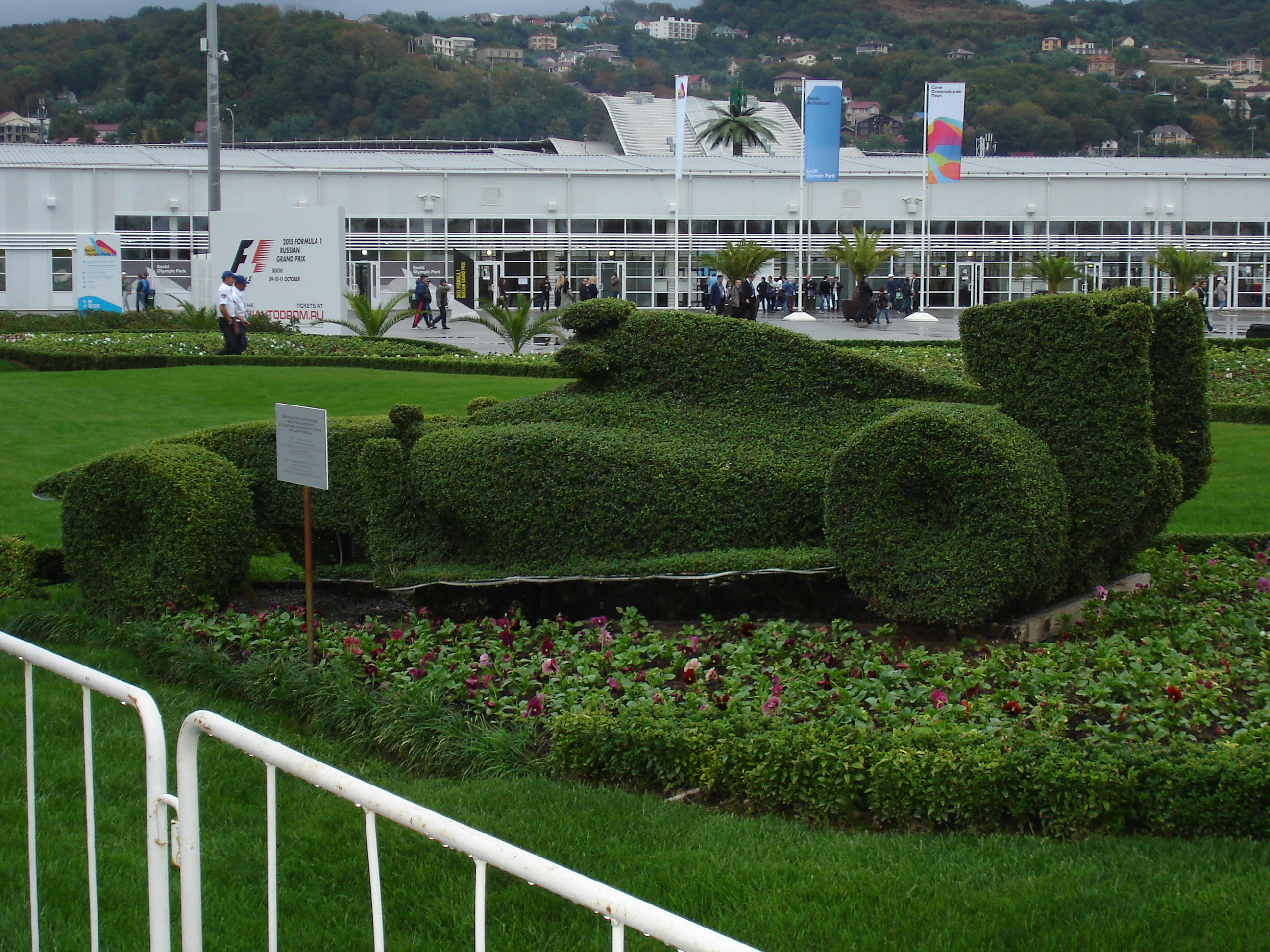 Сочи Автодром, ландшафтная композиция (болид Ф-1)